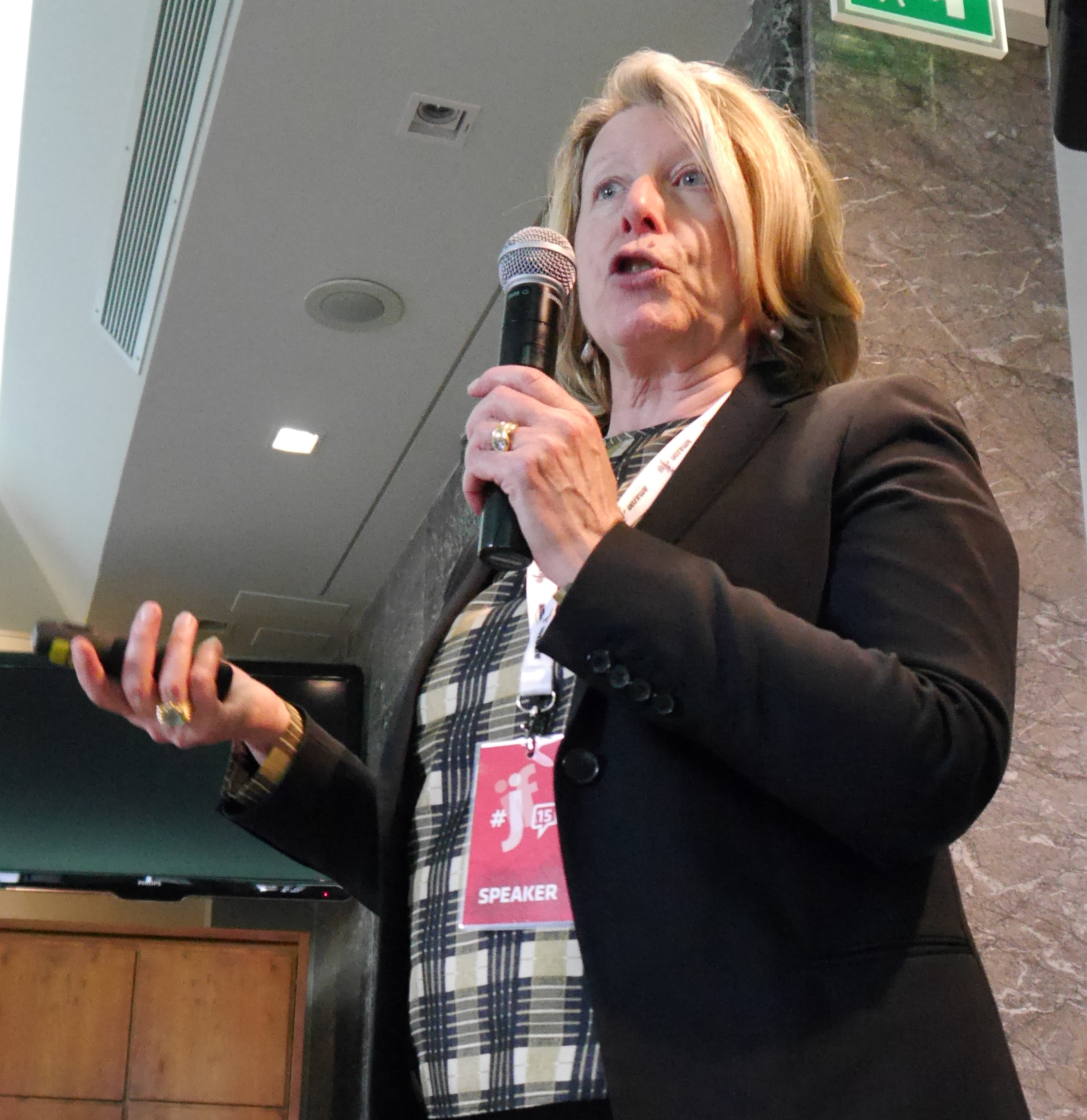 La giornalista italiana Adriana Cerretelli all'edizione 2015 del Festival Internazionale del Giornalismo di Perugia.